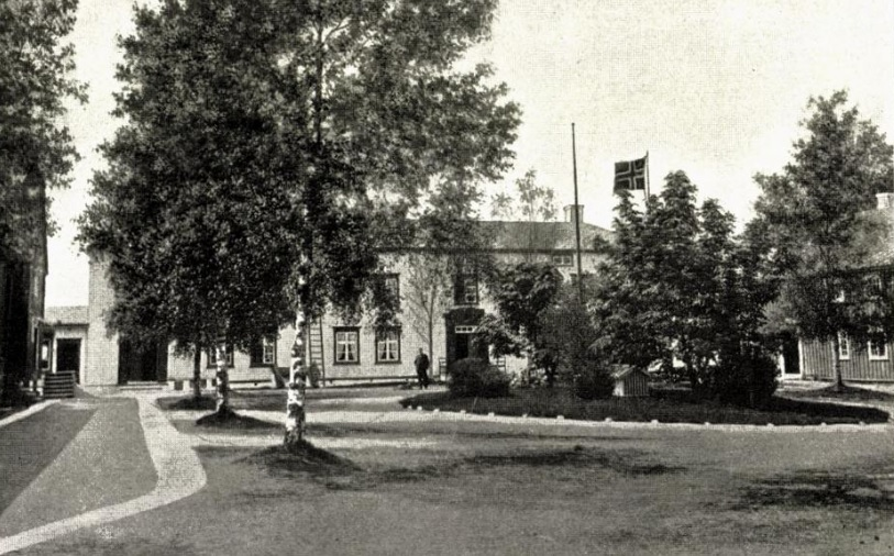 Gårdstunet på Mæle i Stjørdal.